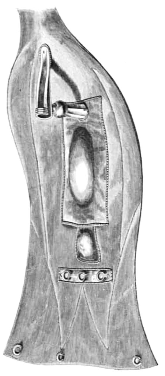 Spatele paftalei mari de la Pietroasa